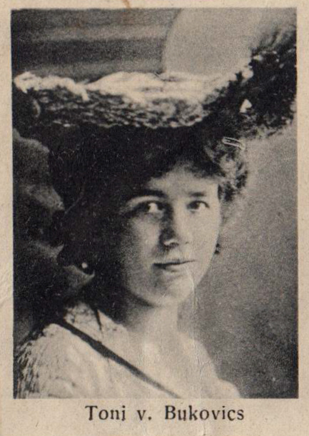 "Toni v. Bukovics" Schauspielerin Eines von 44 Porträts von Ensemblemitgliedern des Stadttheaters Regensburg aus dem ausziehbaren Leporello einer Ansichtskarte "Stadttheater Regensburg", gelaufen 1906.